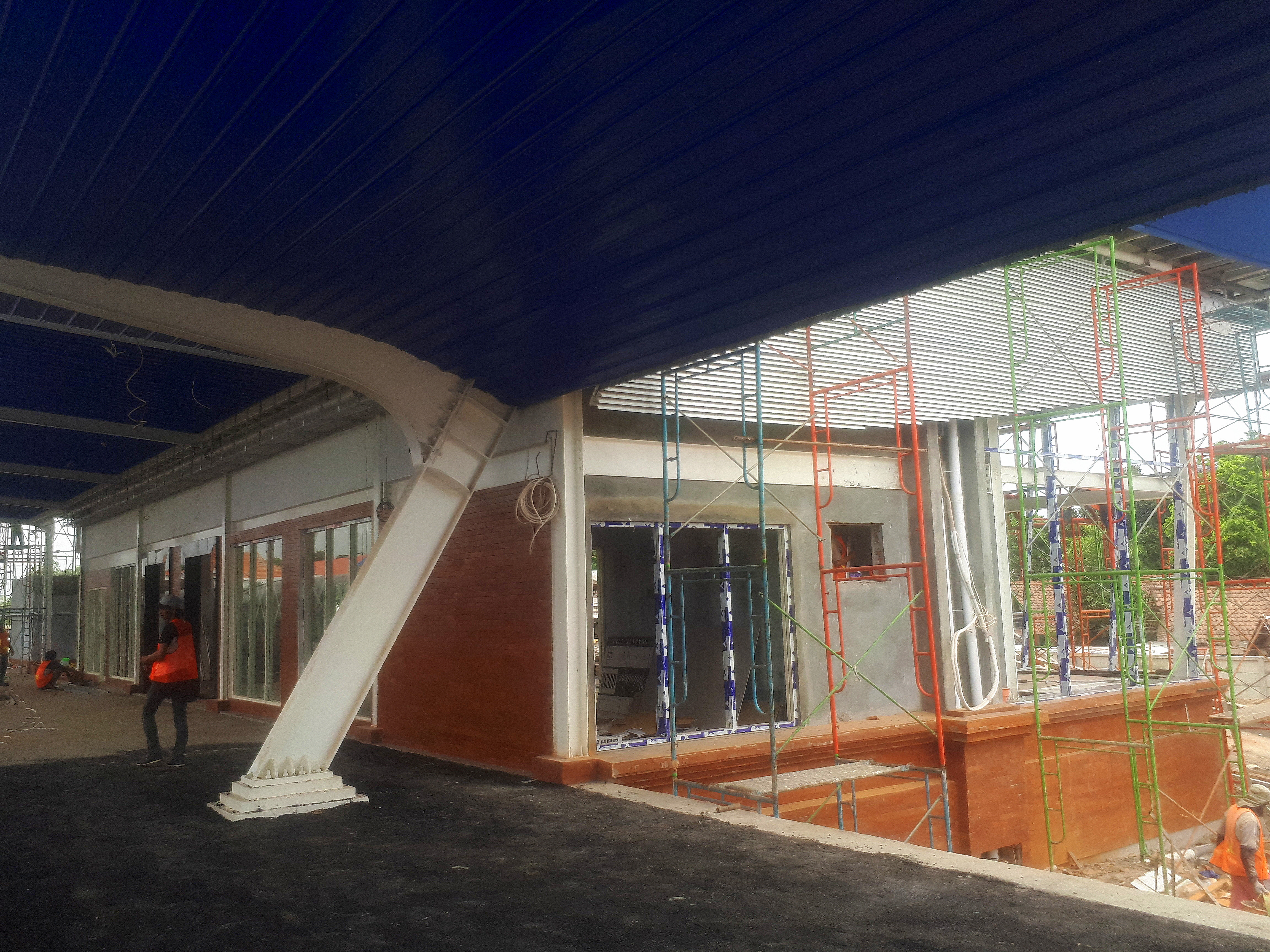 Halte Peterongan hingga kini sedang dalam proses pembangunan, rencana aktif bersamaan dengan pengoperasian jalur ganda Jombang-Mojokerto